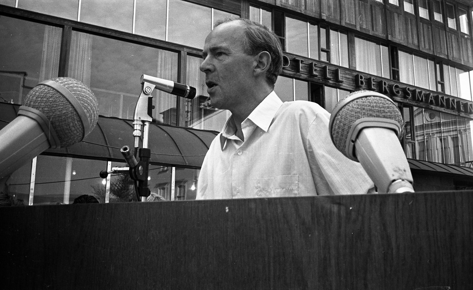 Vänsterpartiet Kommunisterna (VPK) håller valmöte på Södertorget i Örebro, inför valet till Riksdagens Andra Kammare 1968. Talare är partiledaren C.-H. Hermansson.